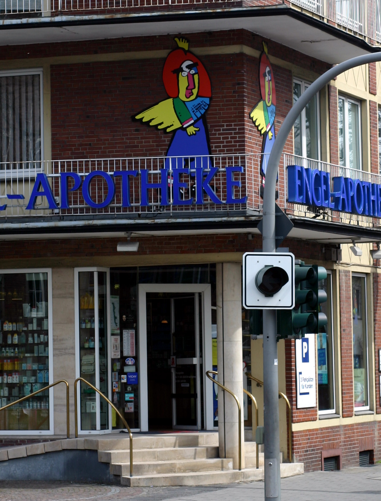 der von Otmar Alt gestaltete Engel an der Engel Apotheke in Münster